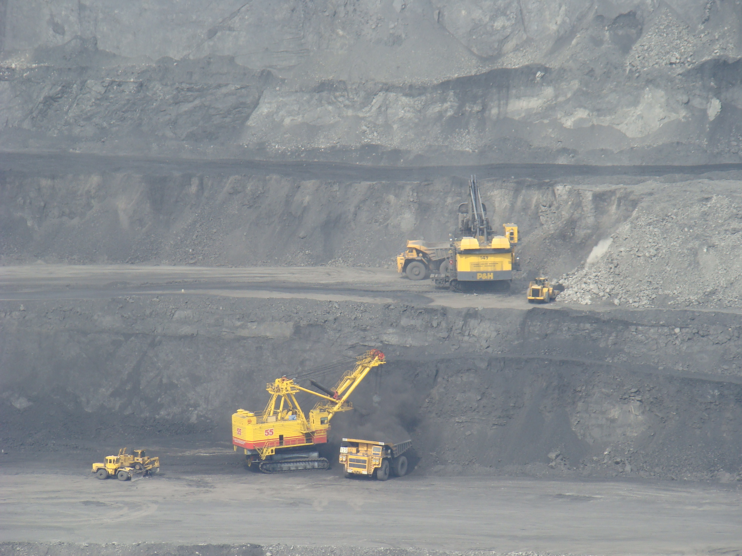 Работа двух экскаваторов